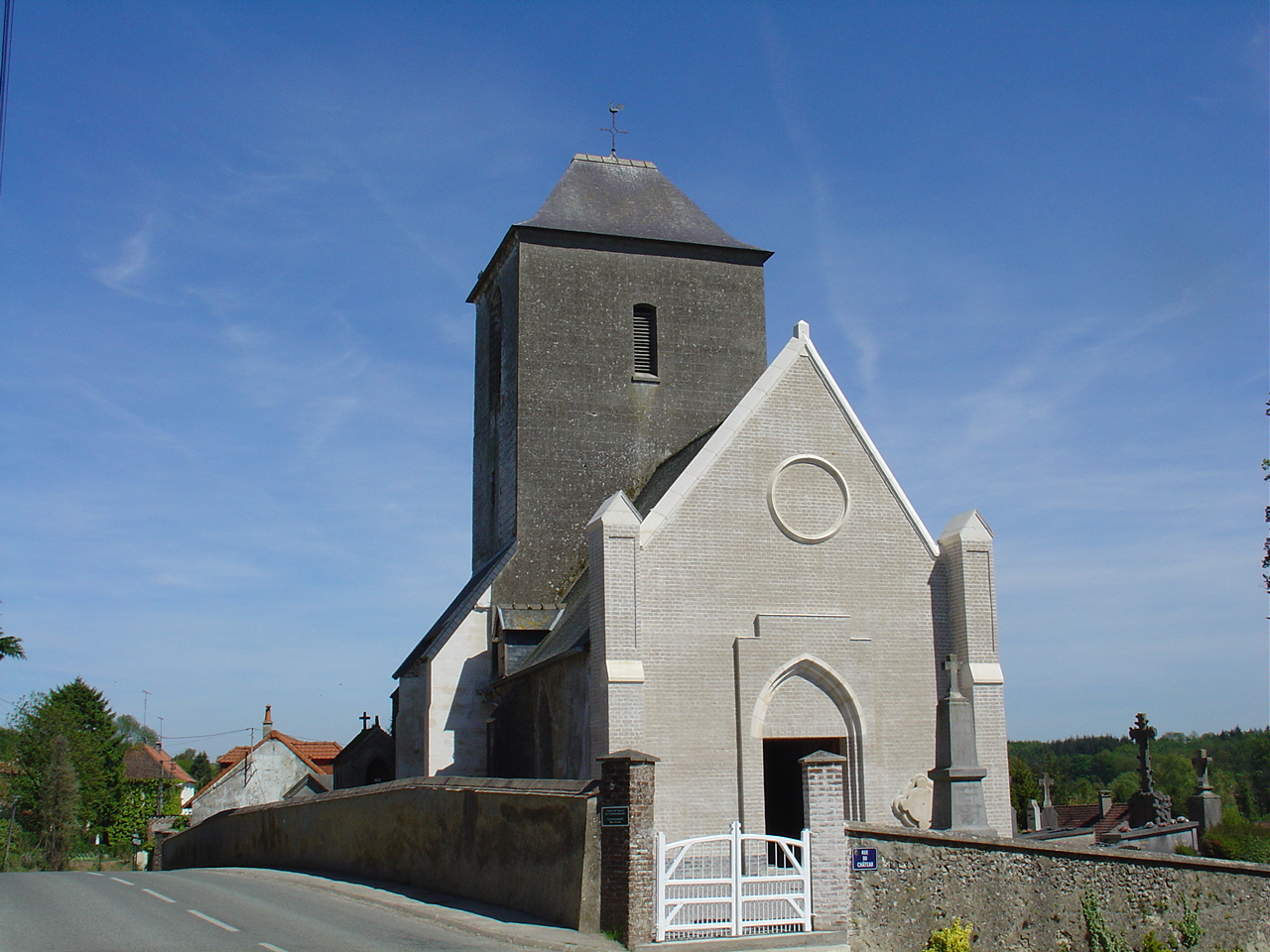 Église d'Enquin-sur-Baillons